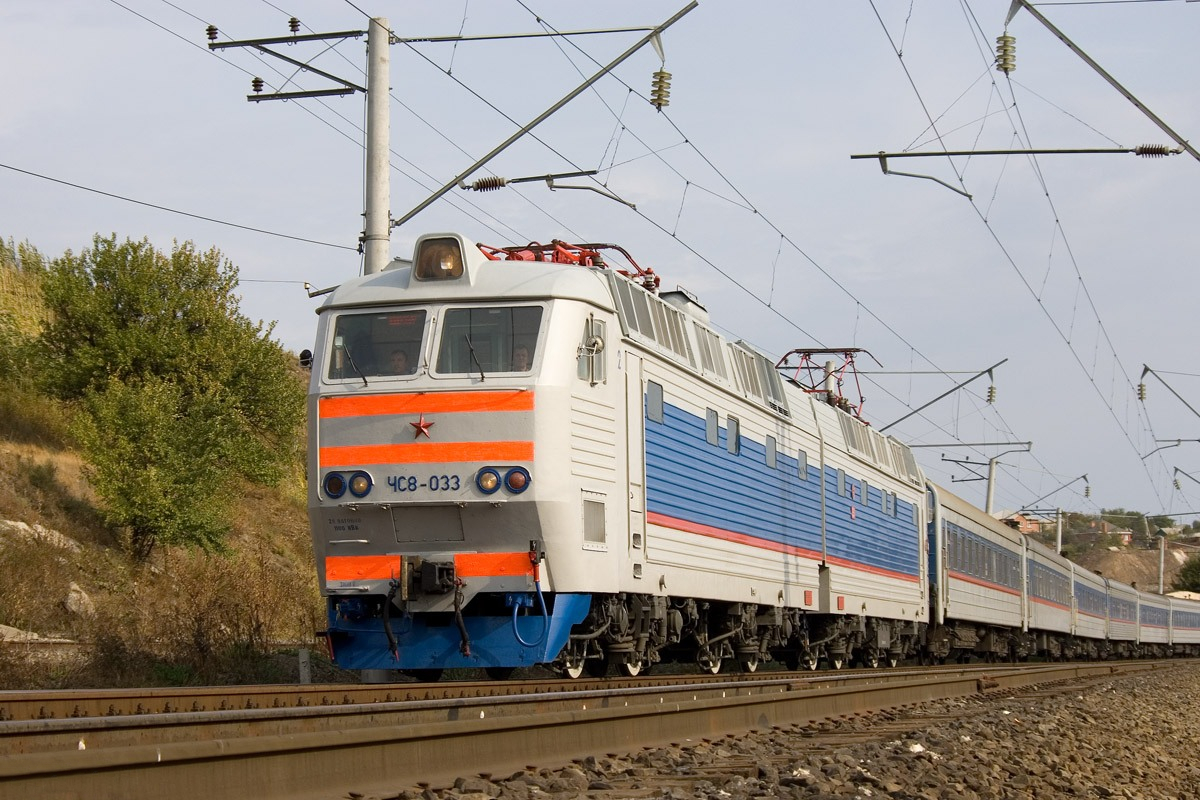 Электровоз ЧС8-033 с поездом, Аксай, Ростовская область